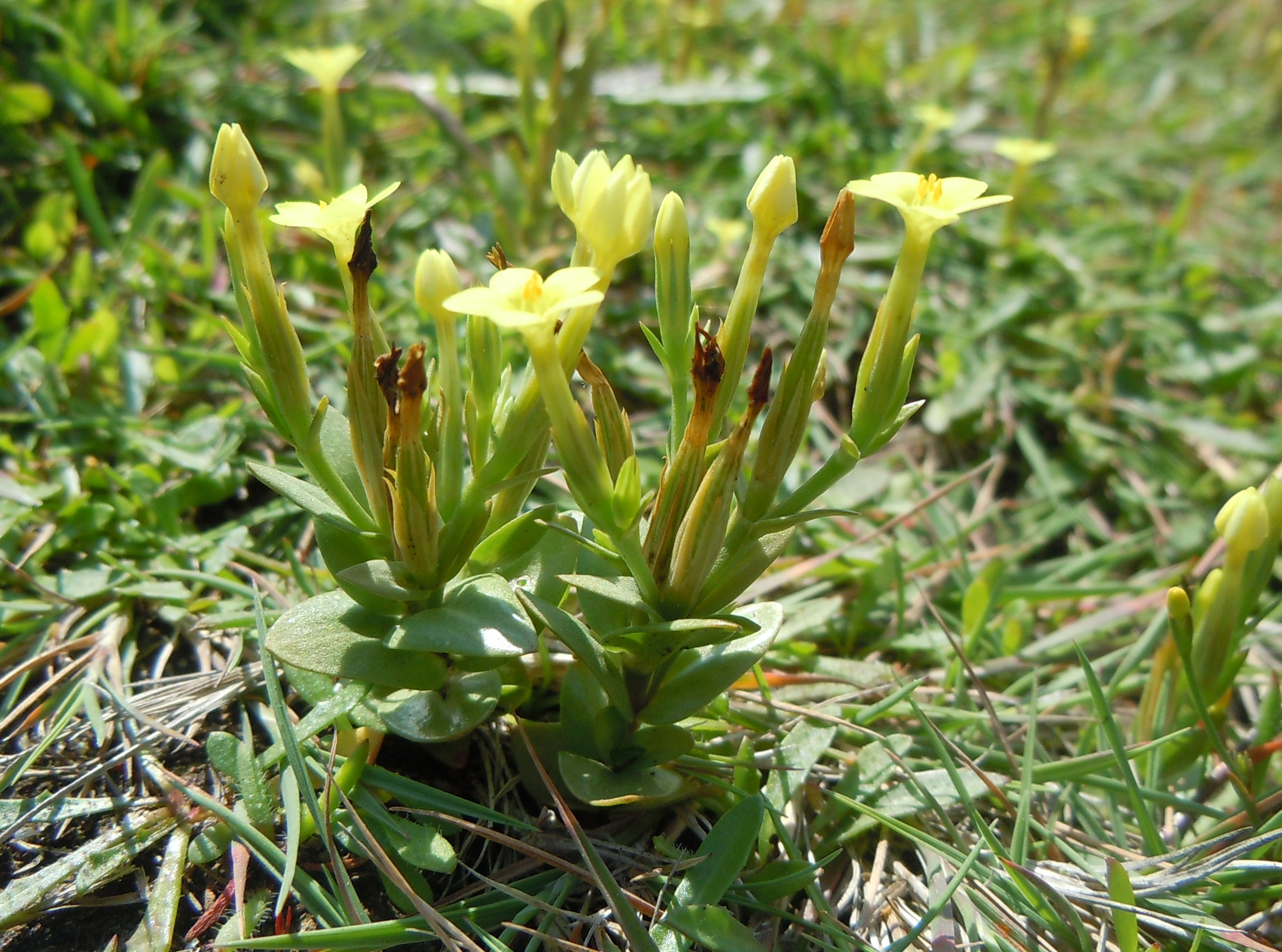 Petite-centaurée maritime - Centaurium maritimum - Belle-Île-en-Mer